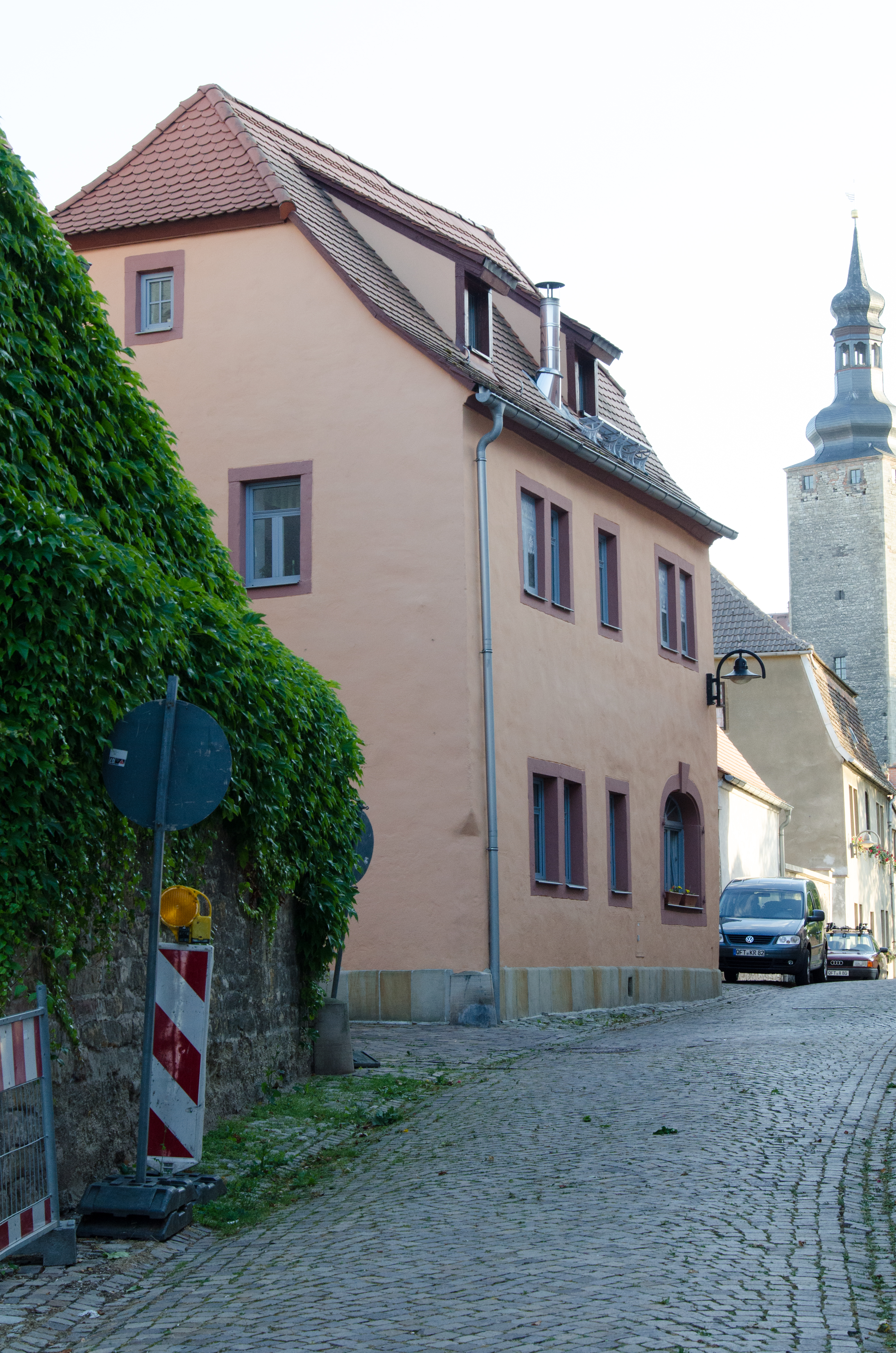 Querfurt, Burggasse 1